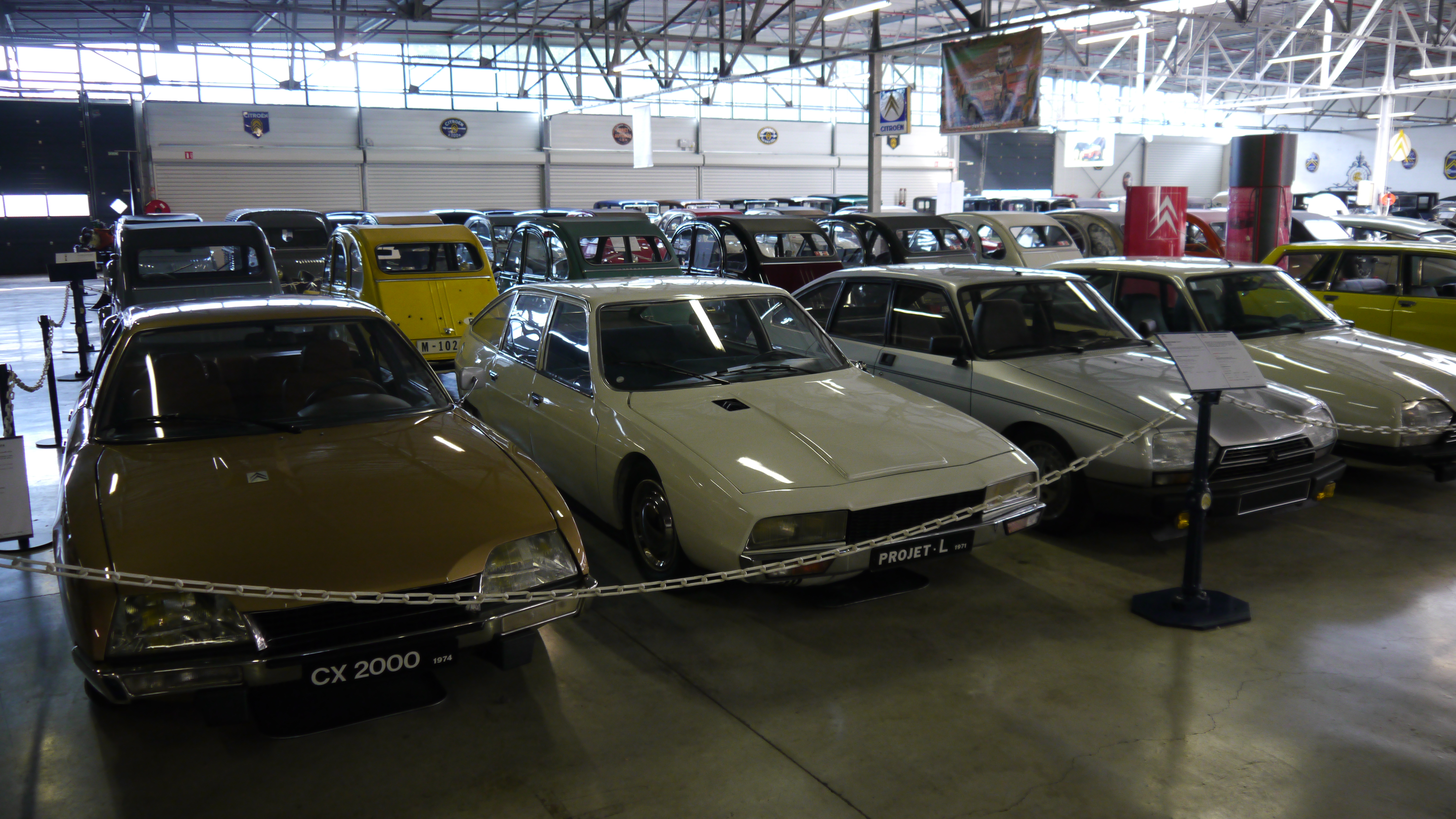 Conservatoire Citroen 134 Citroen CX